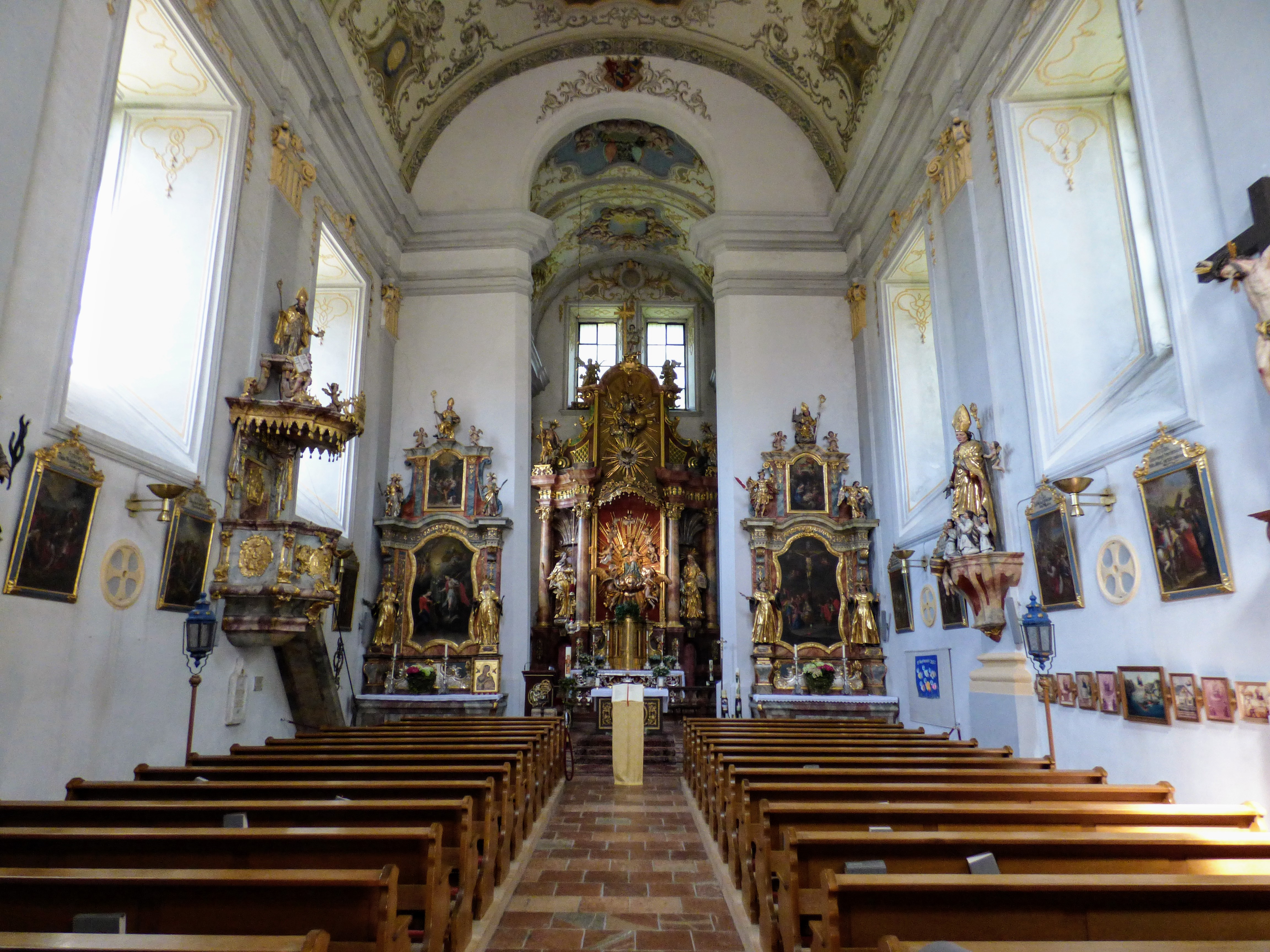 Wallfahrtskirche Dürrnberg, innen